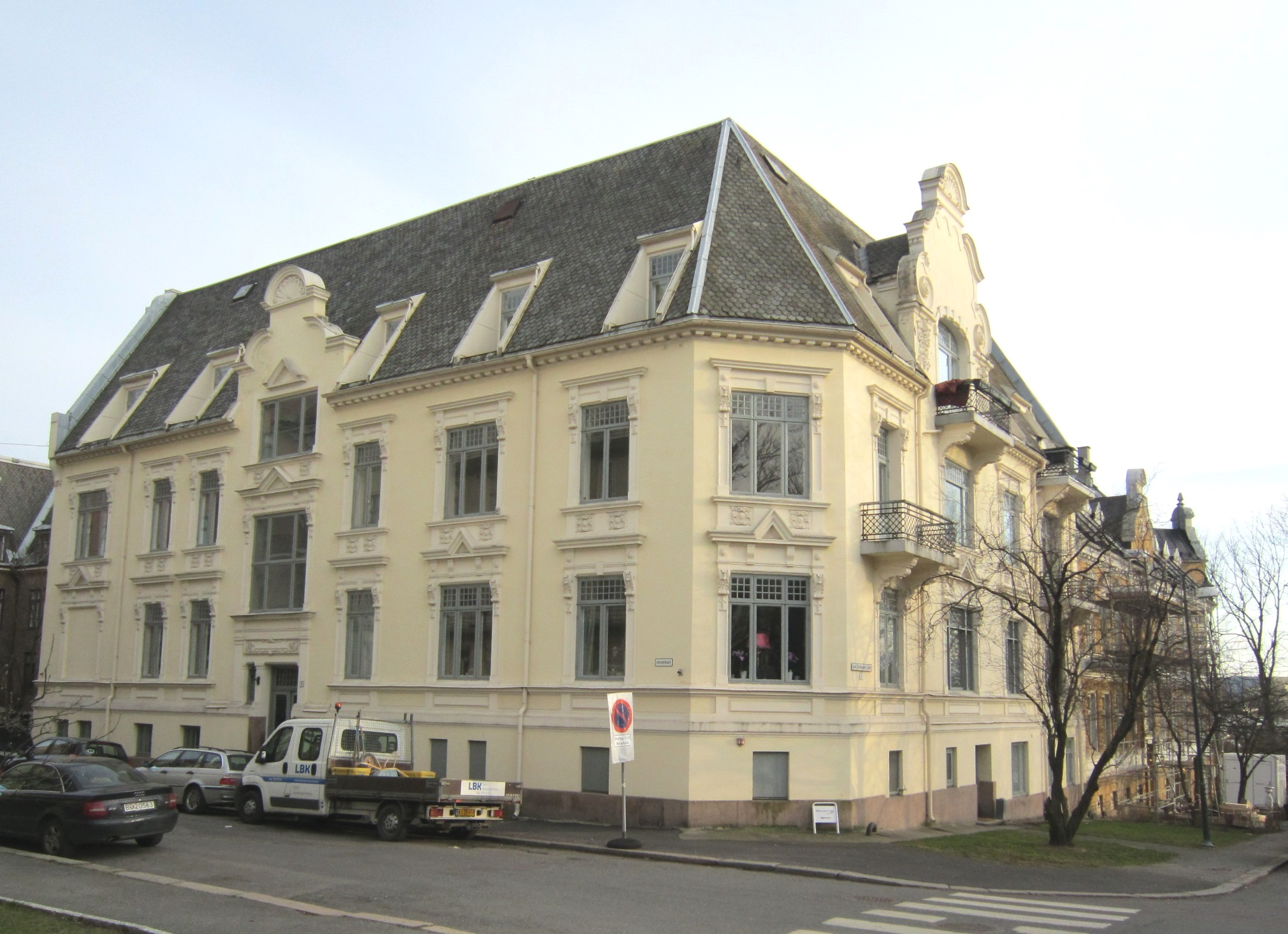 Leiv Eirikssons gate 3 på Skillebekk i Oslo. Arkitekt: Ludwig Zapffe.